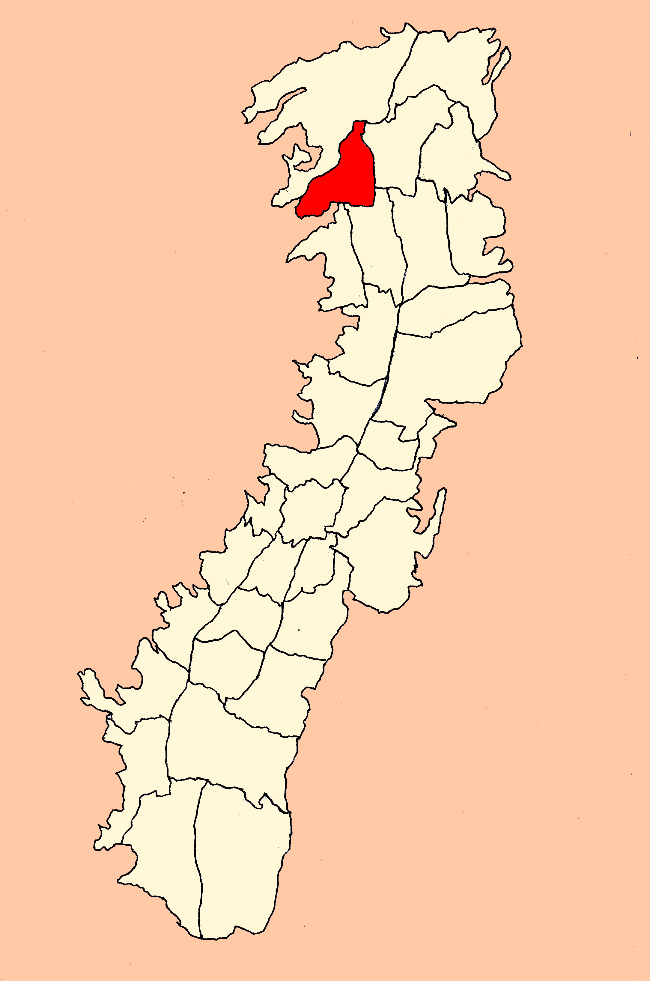 Parroquia Cotocollao (Quito, Ecuador)